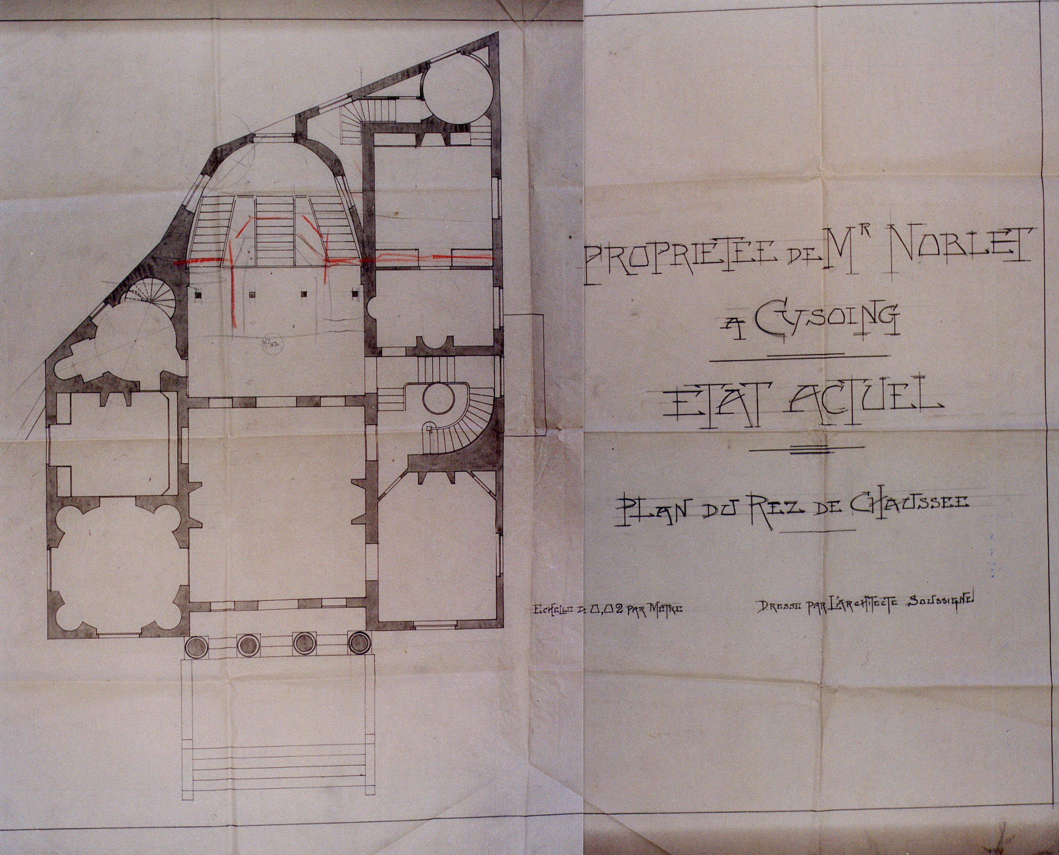 Plan masse d'architecte - non daté, non signé - château de M. Noblet.